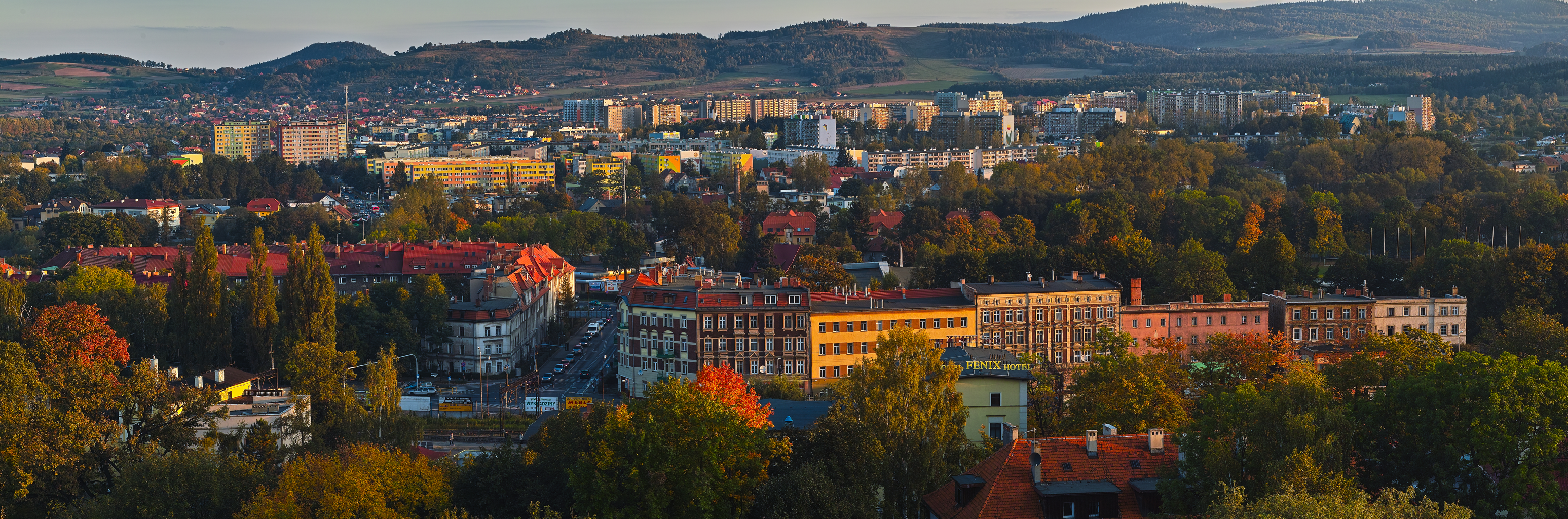 Panorama miasta Jelenia Góra, widok na osiedle Zabobrze od strony Wzgórza Partyzantów.